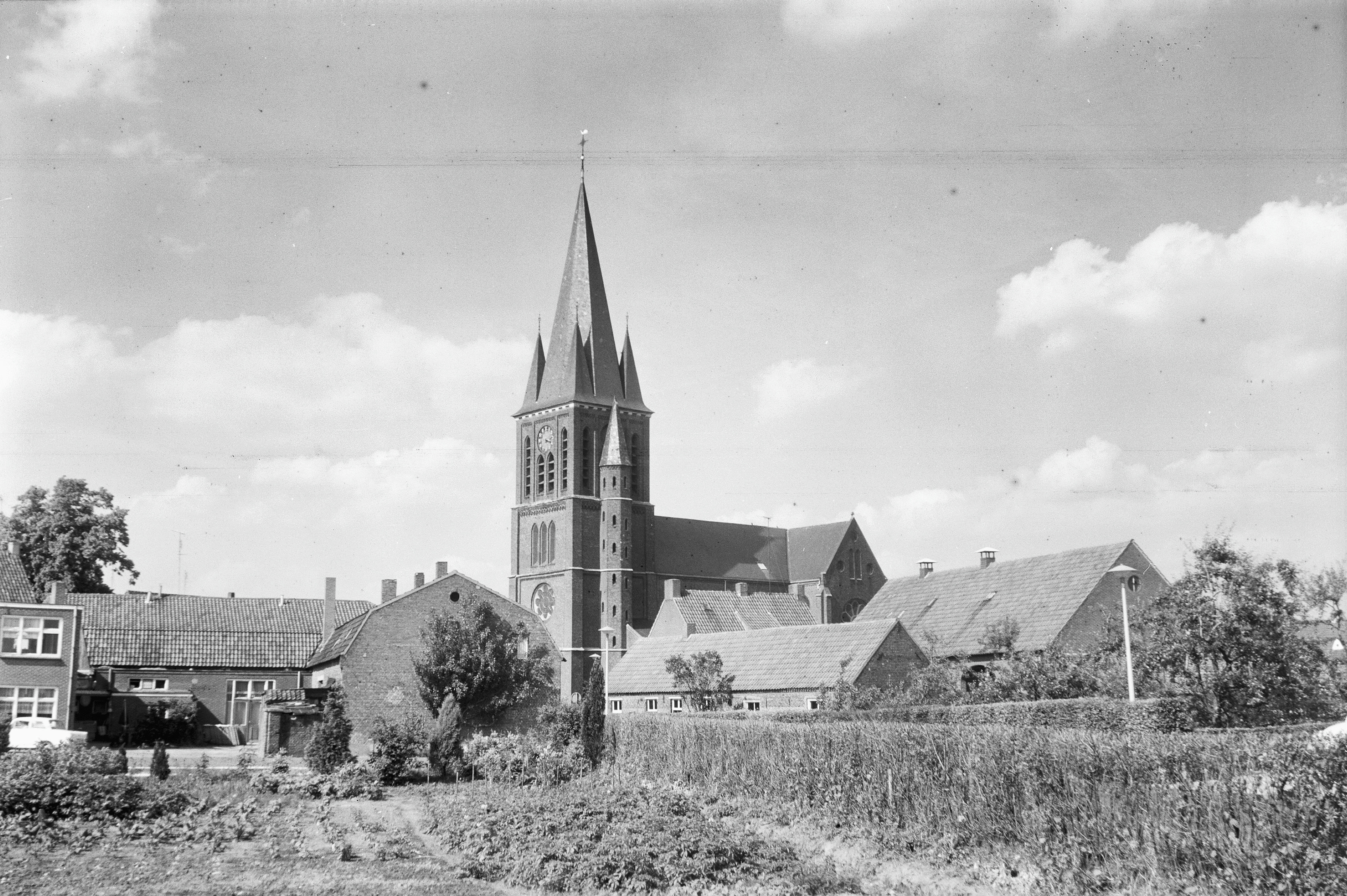 Rooms-Katholieke Kerk: exterieur + overzicht